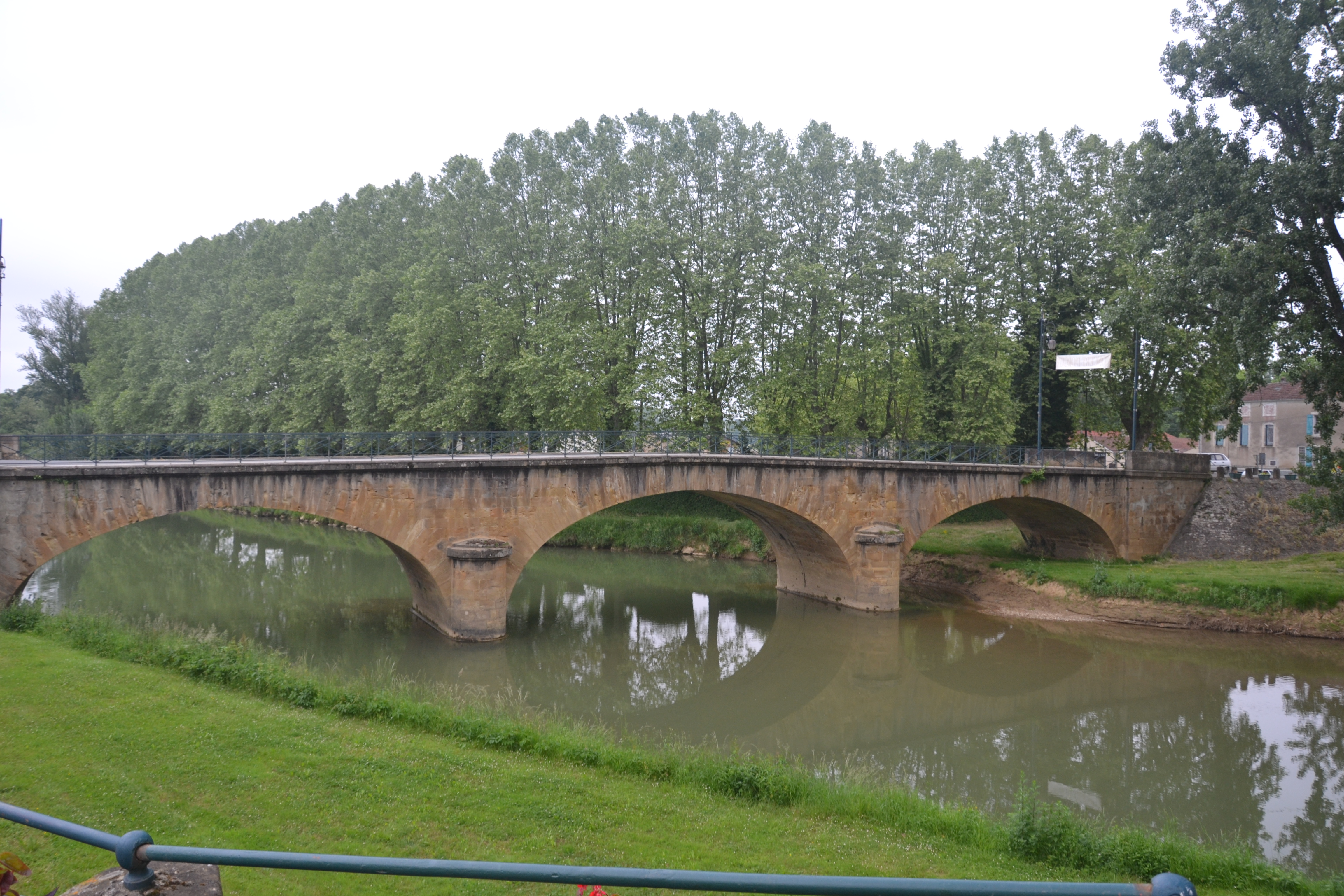 pont sur l'Arros à Plaisance